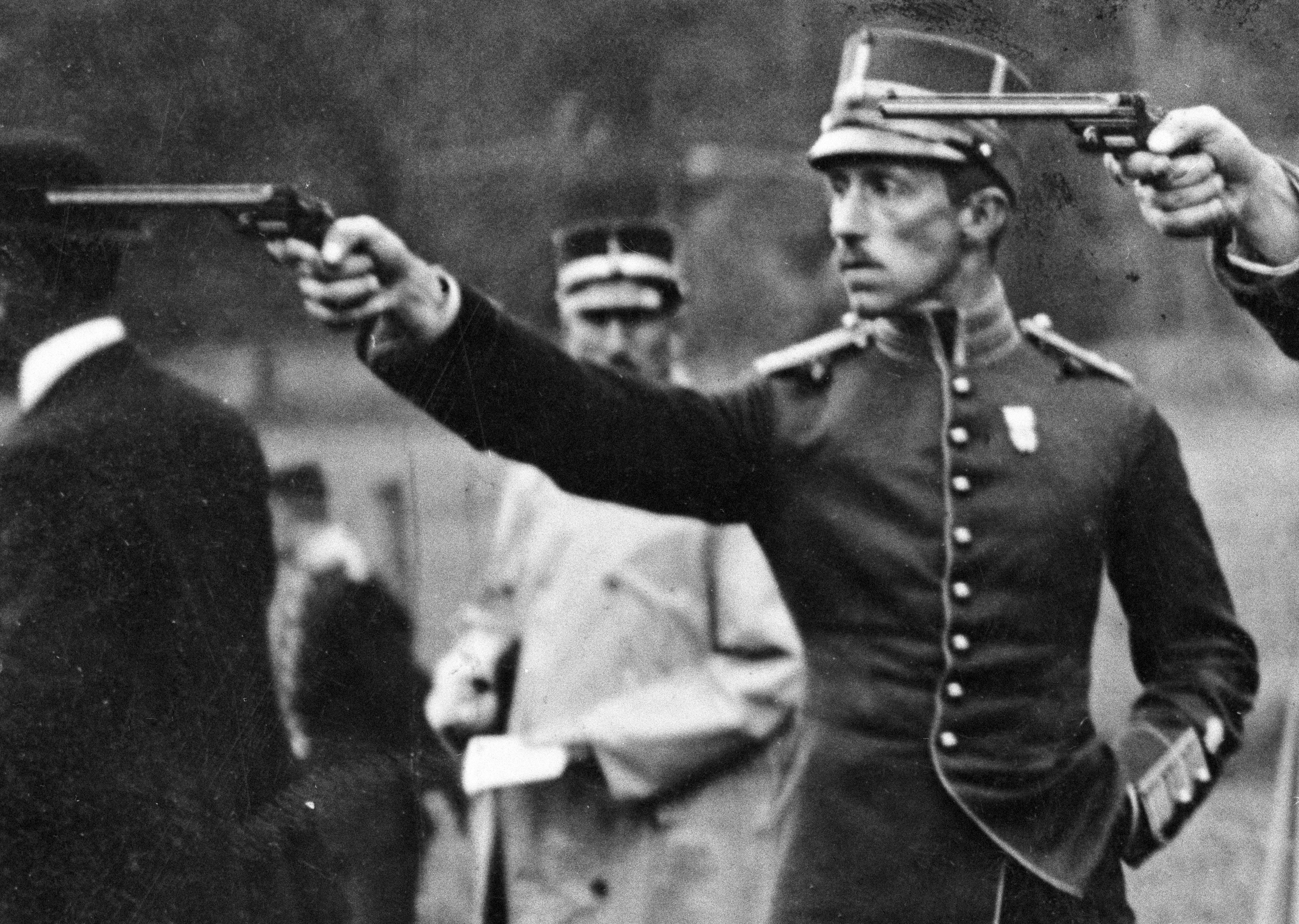 Eric Carlberg på Kaknäs skjubana 1912